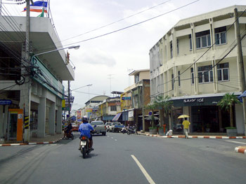 อำเภอพนัสนิคม